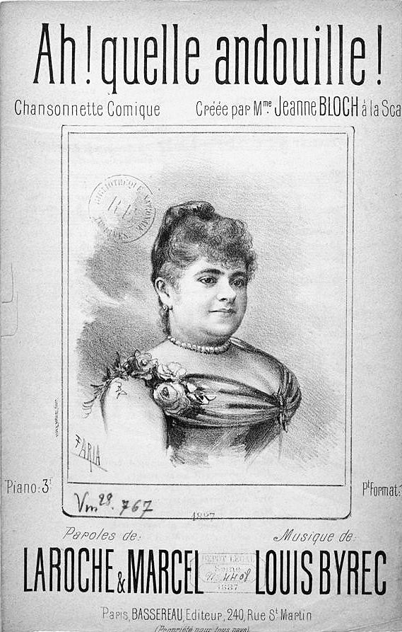 Jeanne Bloch - "Petit format" de Ah ! quelle andouille ! : chansonnette comique, paroles de Laroche et Marcel ; musique de Louis Byrec ; créée par Mme Jeanne Bloch à la Scala. Publié en 1887